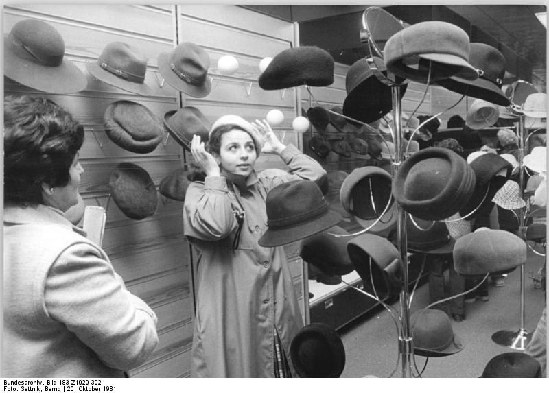 Berlin, Centrum Warenhaus, Hutabteilung ADN-ZB Settnik 20.10.81 Berlin: Centrum-Warenhaus am Ostbahnhof. Eröffnet am 27.9.79. Täglich besuchen ca. 50000 bis 60000 Kunden das Haus. Anprobe in der Hutabteilung. -siehe auch Z1020-300,301,303N